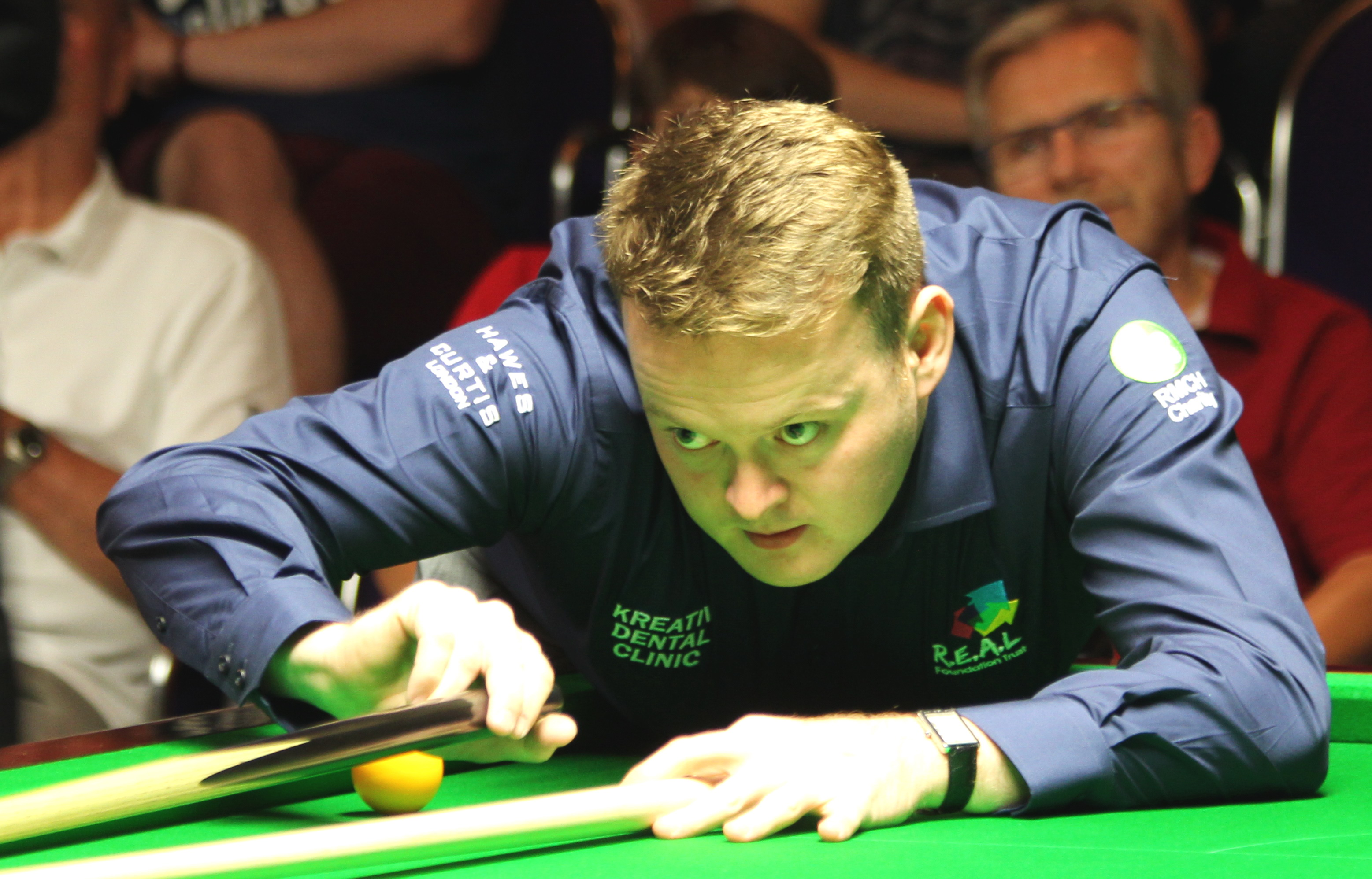 Shaun Murphy beim Paul Hunter Classic 2015